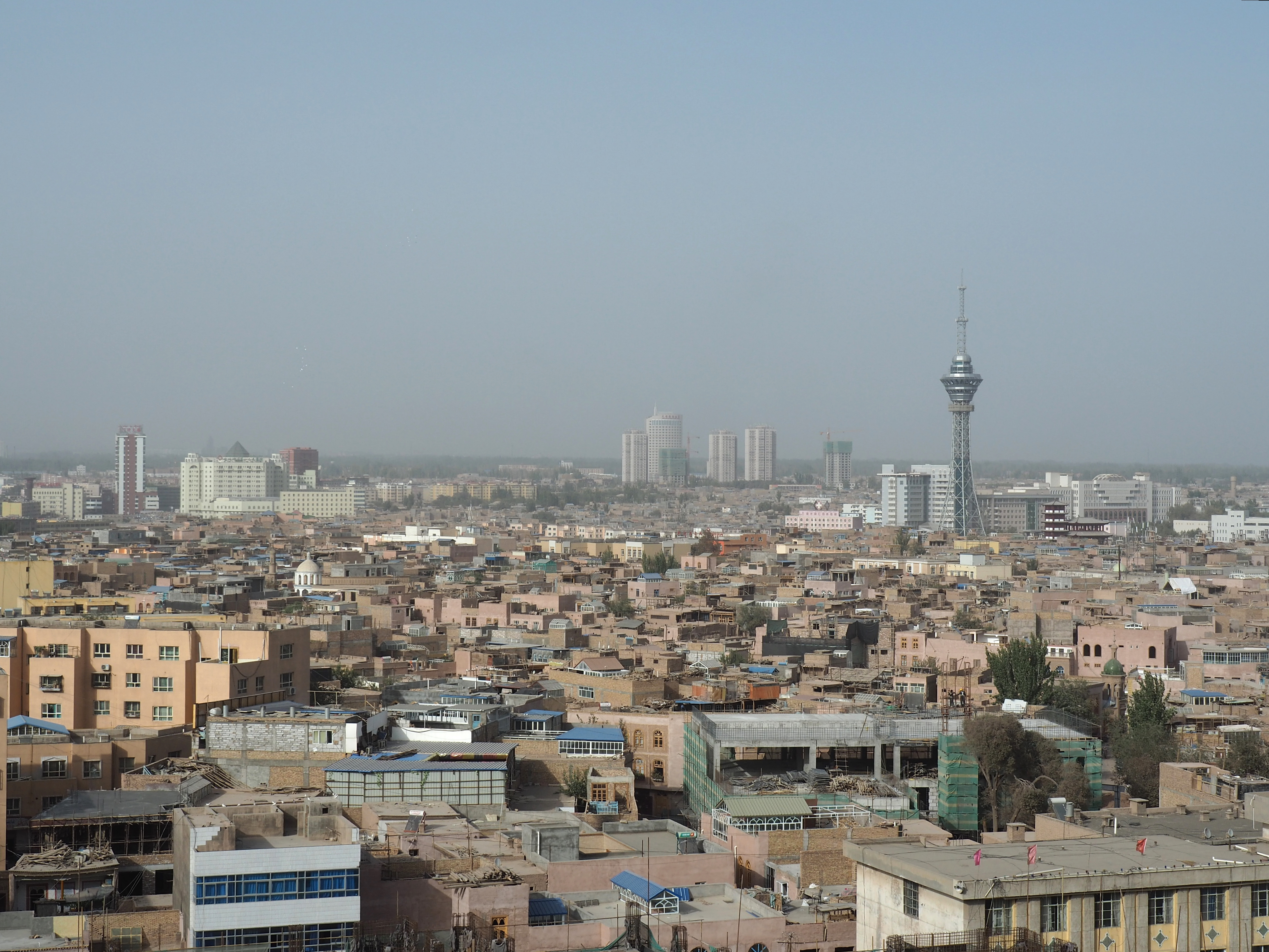 Kashgar